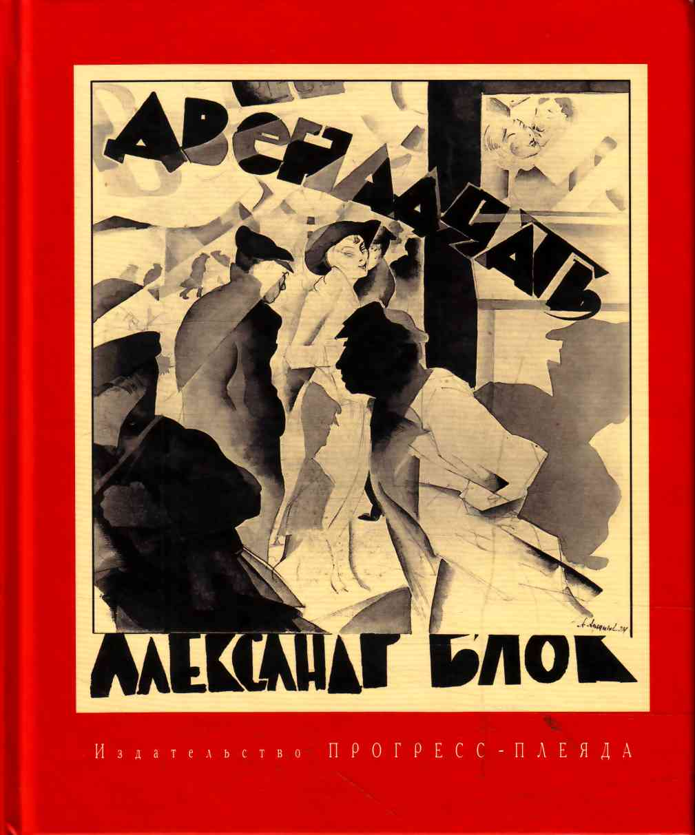 Блок. «Двенадцать». Иллюстрация Александра Аршинова